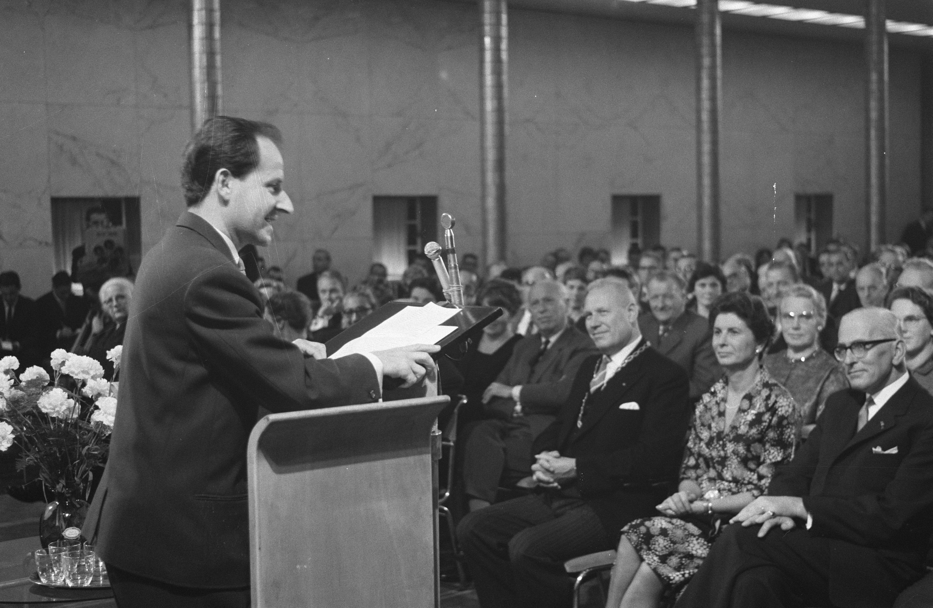 Collectie / Archief : Fotocollectie Anefo Reportage / Serie : [ onbekend ] Beschrijving : Uitreiking televisieprijs van Prins Bernhardfonds aan Milo Anstadt Datum : 6 oktober 1960 Trefwoorden : Uitreikingen, prijzen Persoonsnaam : Anstadt, Milo Instellingsnaam : Prins Bernhard Fonds Fotograaf : Pot, Harry / Anefo, [onbekend] Auteursrechthebbende : Nationaal Archief Materiaalsoort : Negatief (zwart/wit) Nummer archiefinventaris : bekijk toegang 2.24.01.05 Bestanddeelnummer : 911-6532